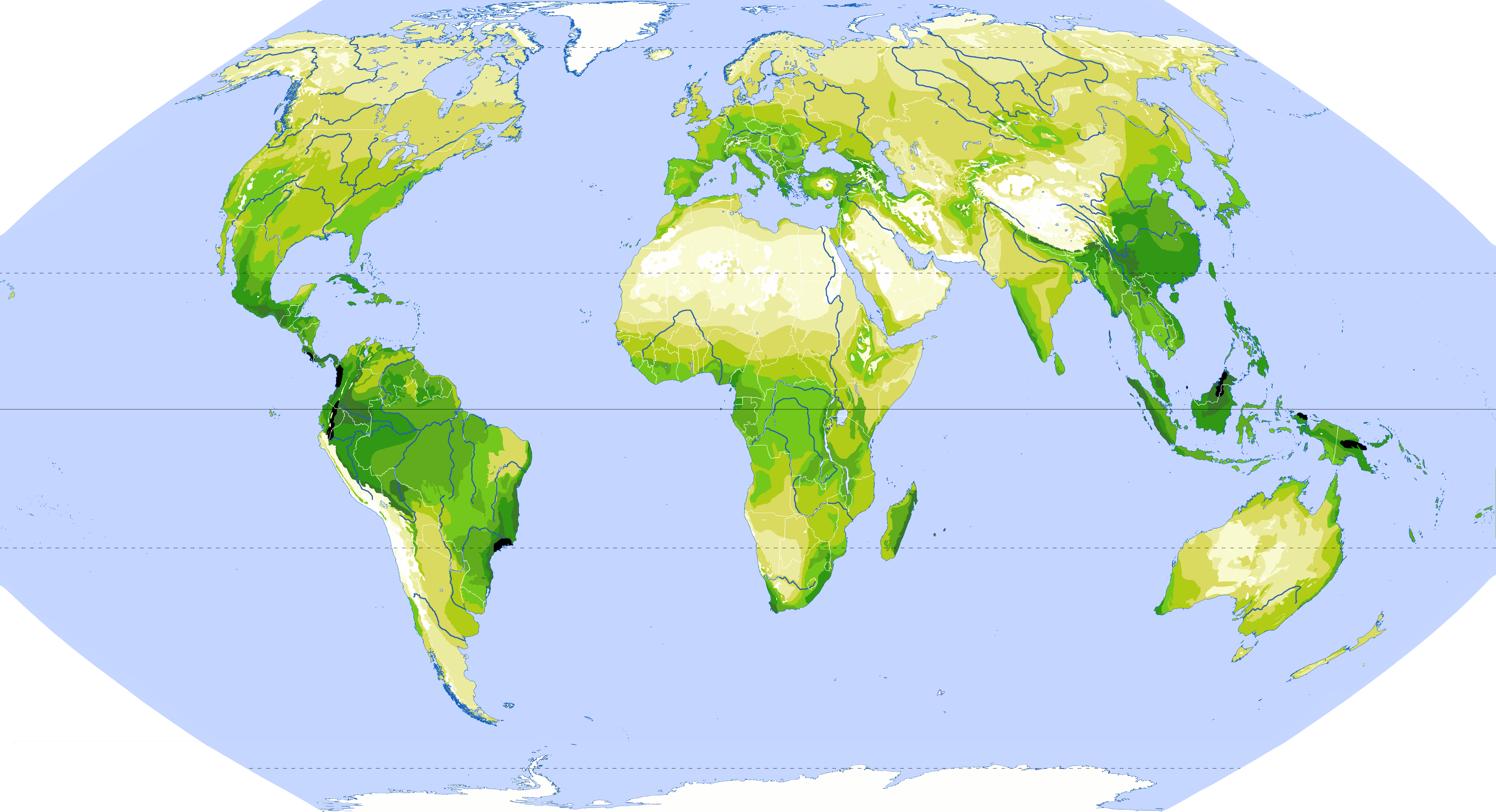 Globale Verteilung der Biodiversität, bezogen auf die Anzahl der Gefäßpflanzen-Arten auf je 10.000 km² Legende Artenzahl pro 10.000 km² 5.000